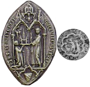 fondation de la Collegiale st-Etienne de Troyes, Henry le libéral à genoux offre la collègiale à Etienne.